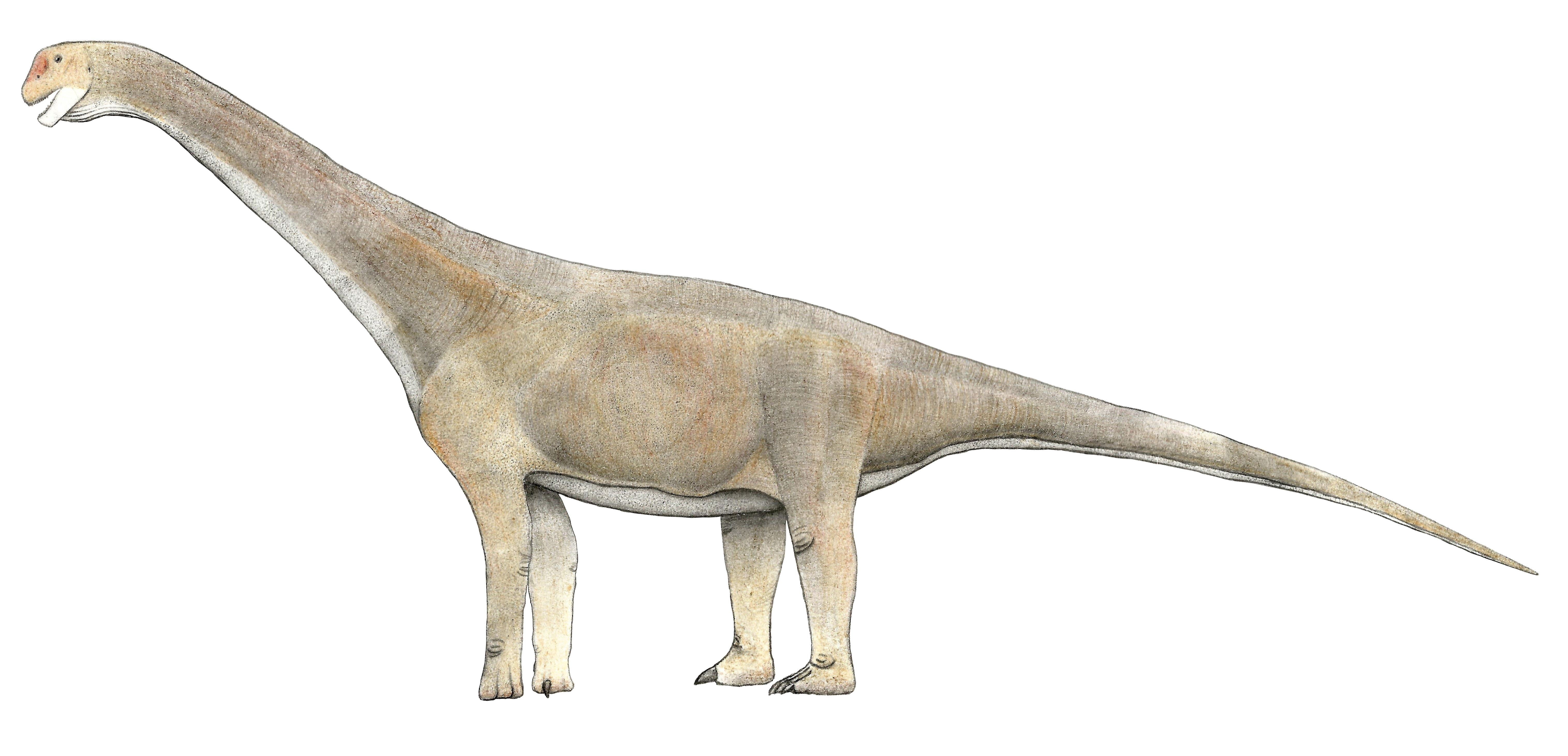 Recreación de Tehuelchesaurus benetezii